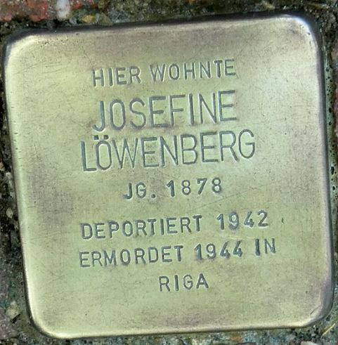 Stolperstein von Josefine Löwenstein verlegt in Datteln Marktstraße 13